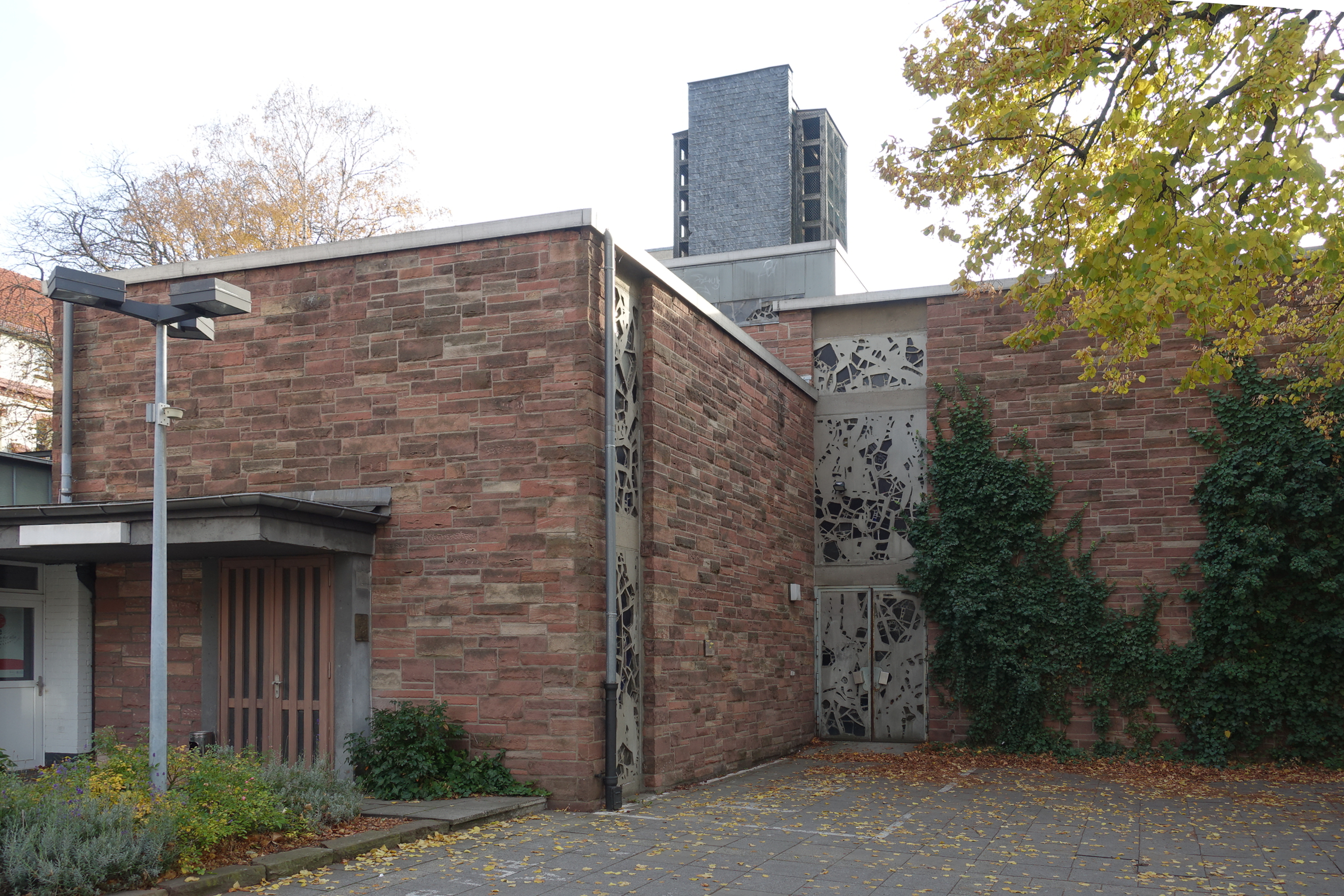 ehemalige Klosterkirche Maria Regina